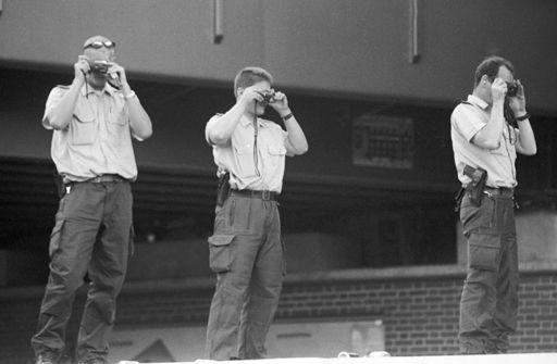 Polizisten mit Fotokameras